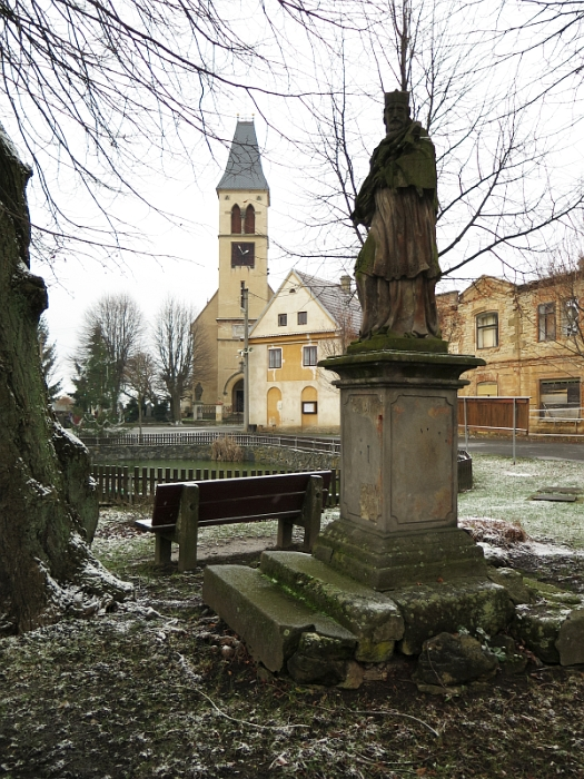 Socha svatého Jana Nepomuckého, náves, pp. 1796/1, Vidim.